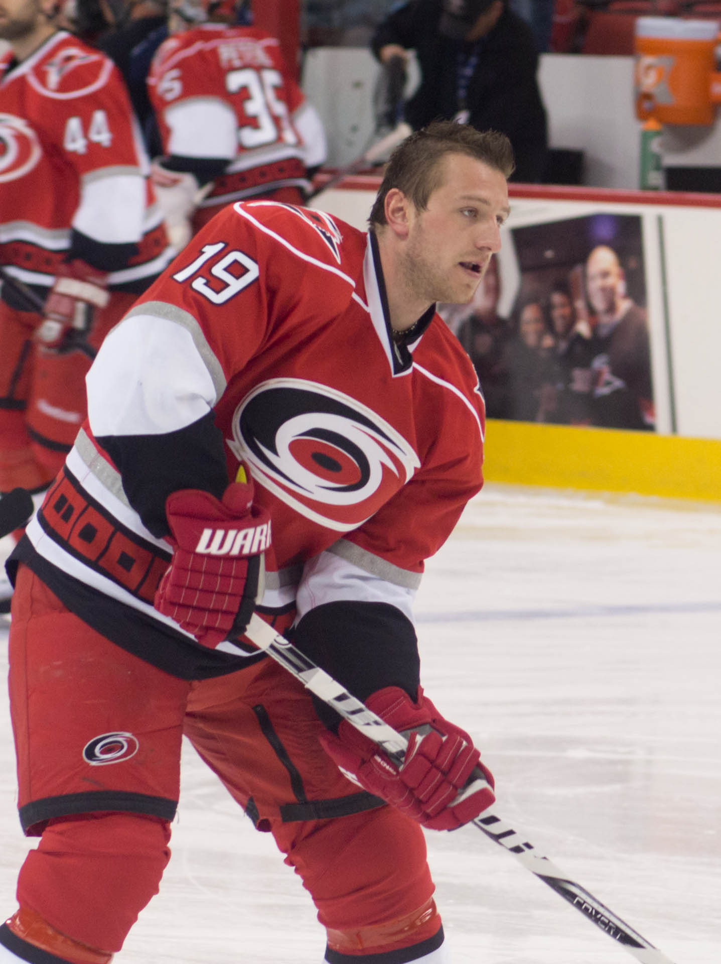 Jiří Tlustý, Czech ice hockey player